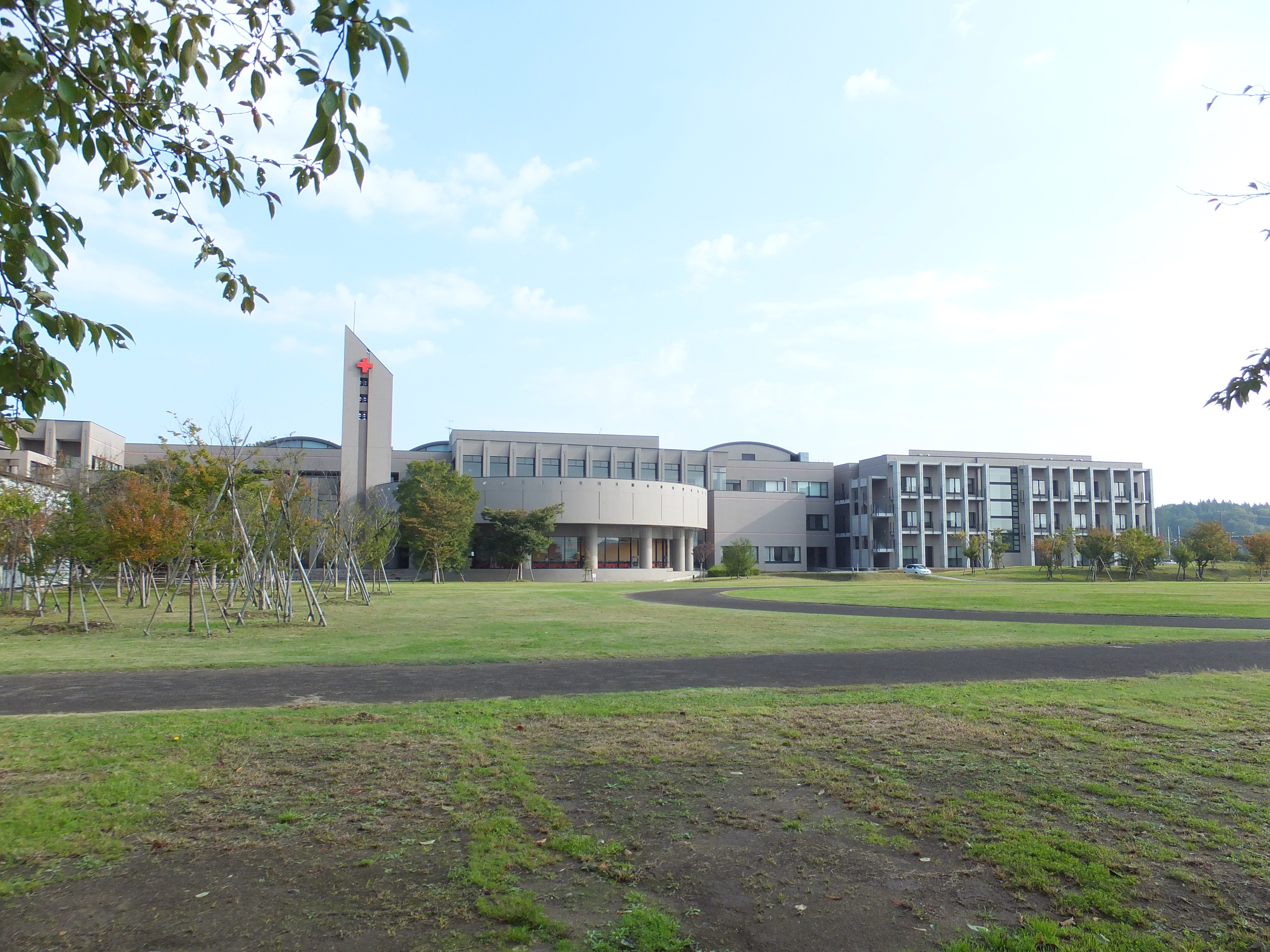 日赤秋田看護大および日赤秋田短大